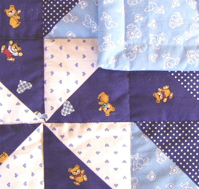 Patchwork - detail zpracování. Jsem autorem tohoto snímku. Obrázek pochází z výstavy patchwork